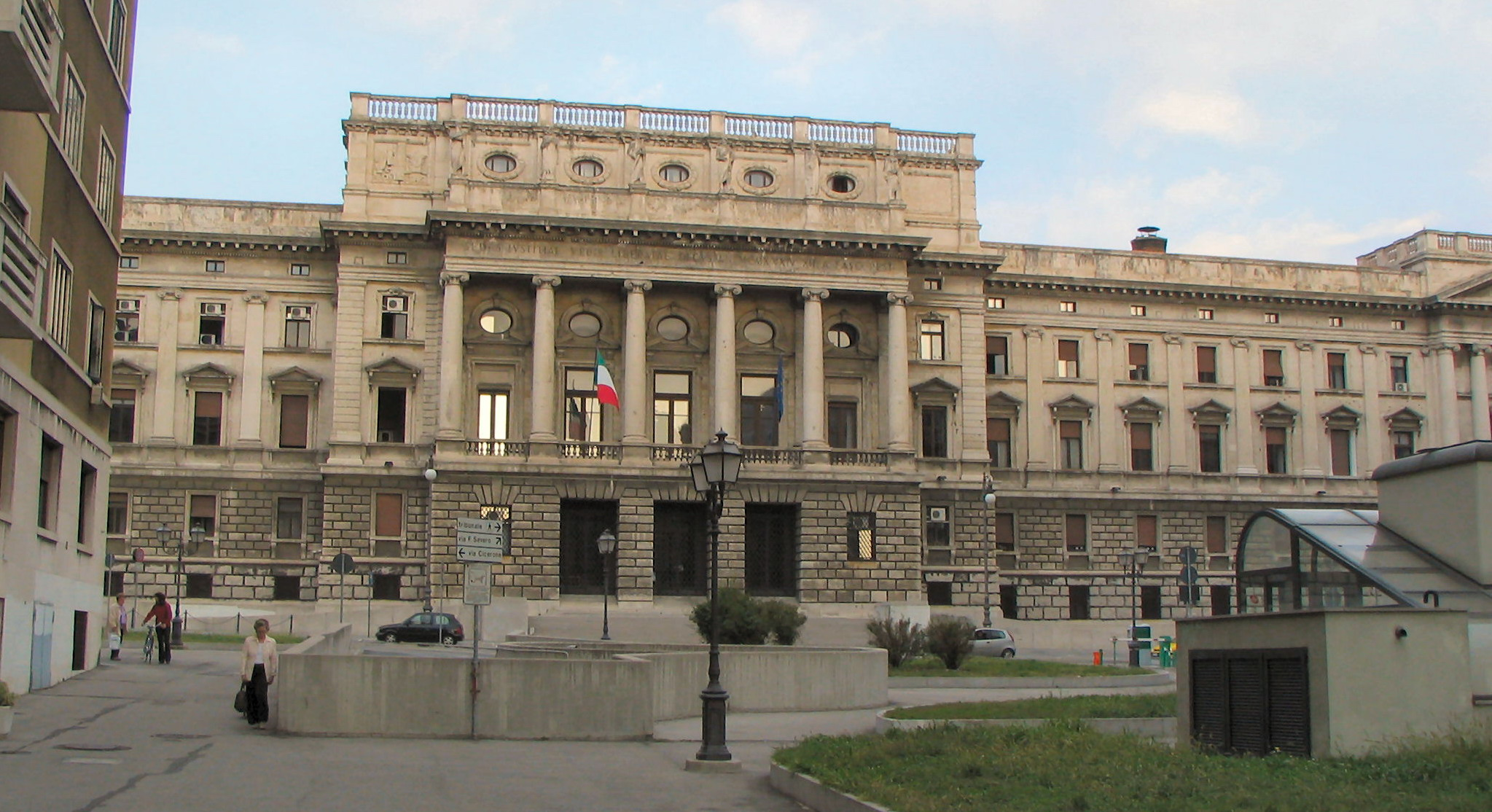 Tribunale ed il nuovo parcheggio sotterraneo